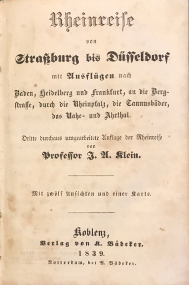 Title page of Baedekers "Rheinreise" 1839